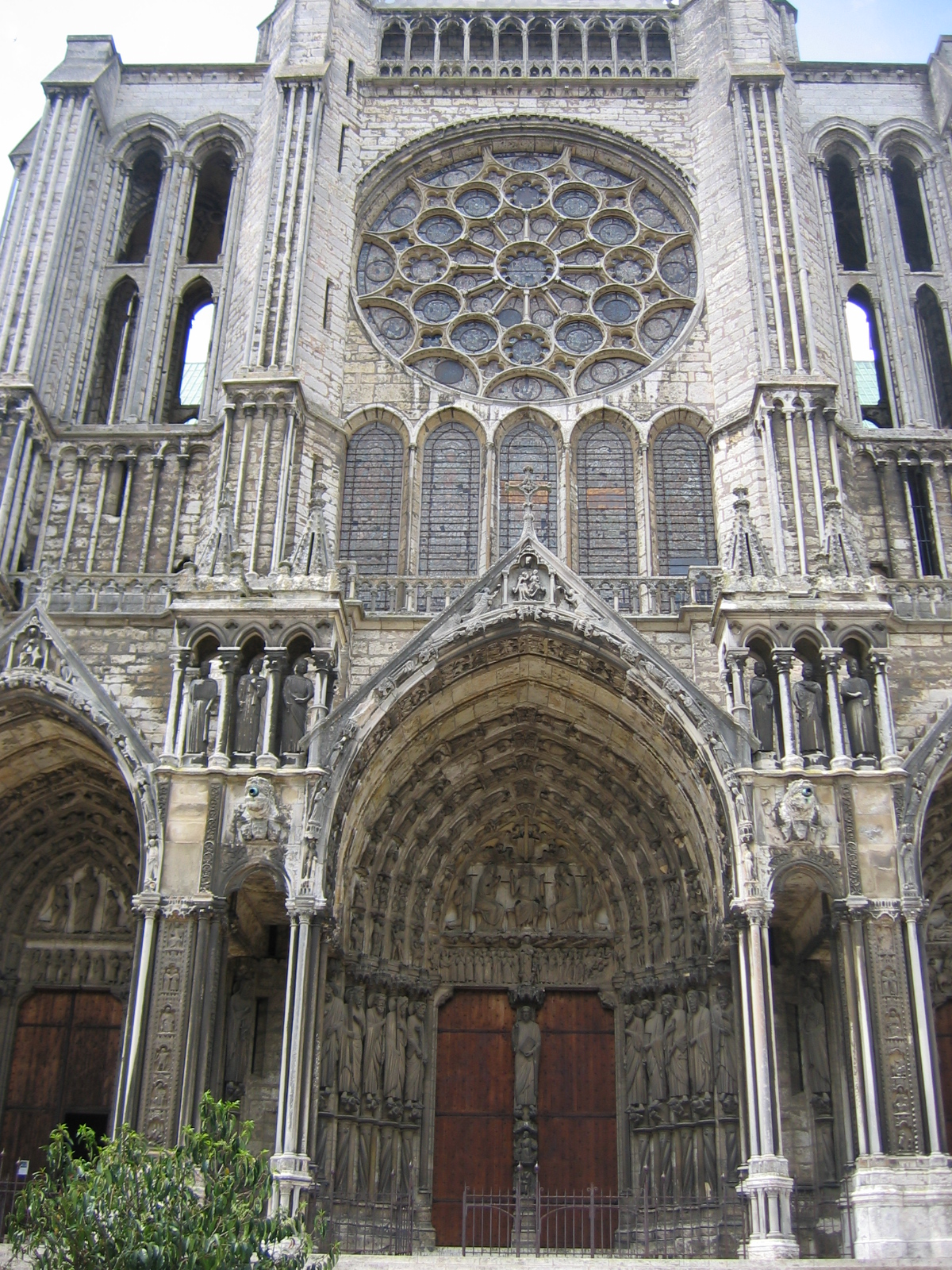 Porche Sud de la cathédrale de Chartres, portail central